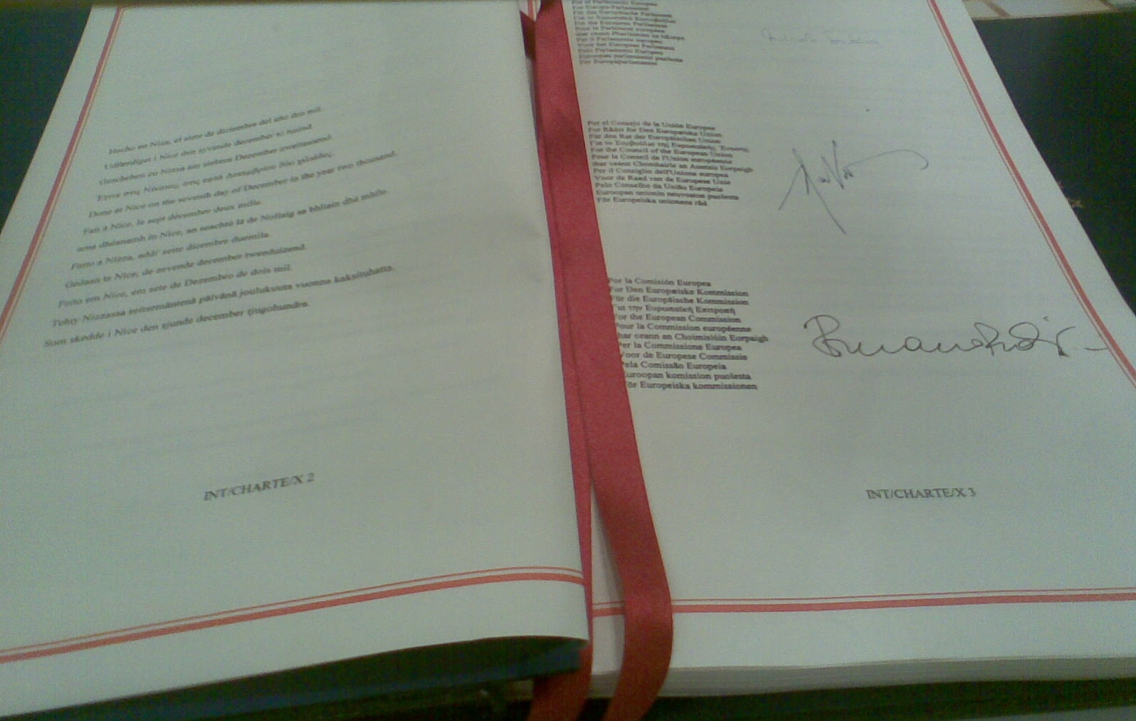 Het Verdrag van Nice (fragment). Fragment van het originele boekwerk dat het Verdrag van Nice vormt. Het lag in 2008 voor het publiek ter inzage in het gebouw van het Europees Parlement in Brussel.